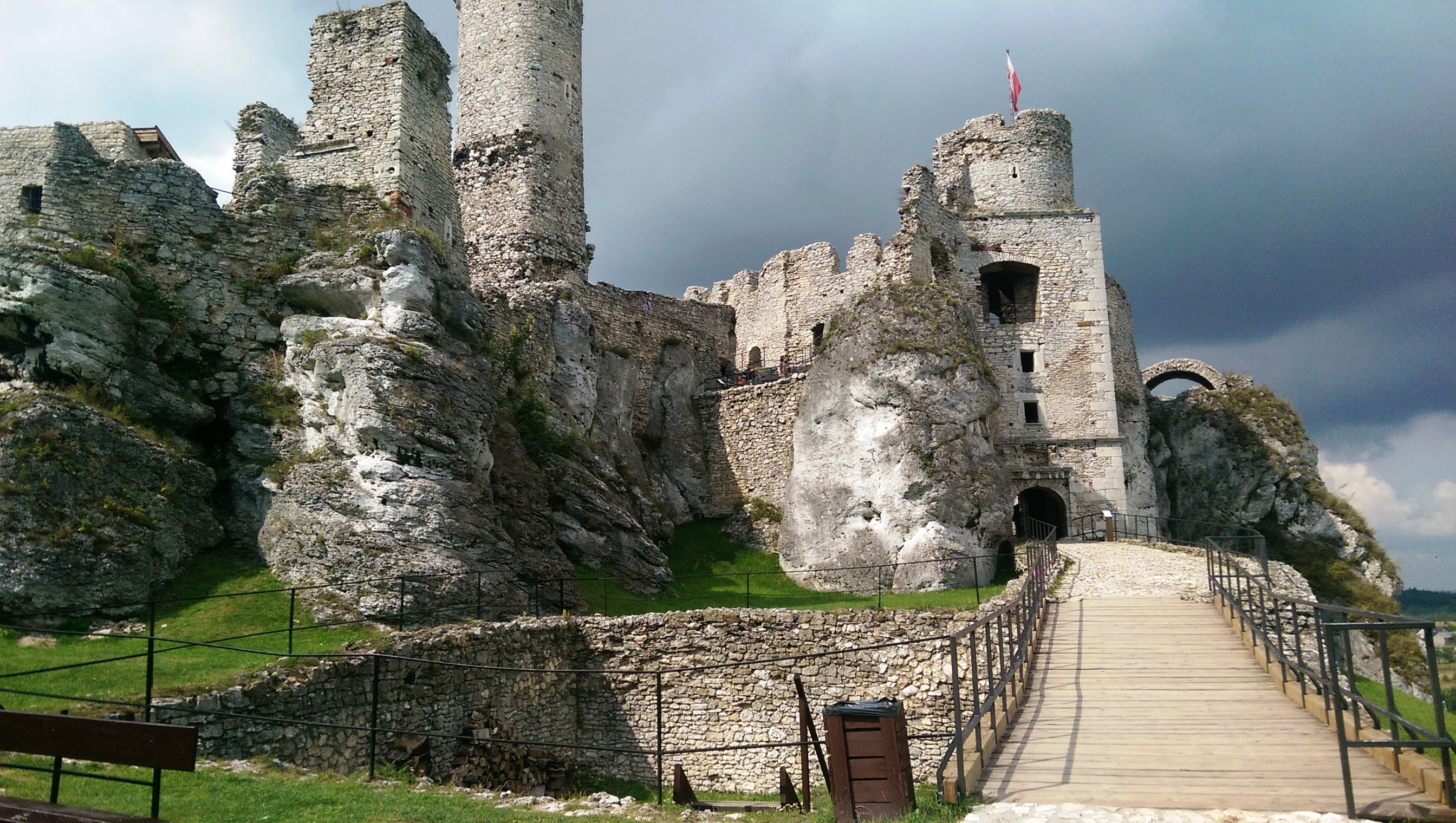 Widok z przedzamcza